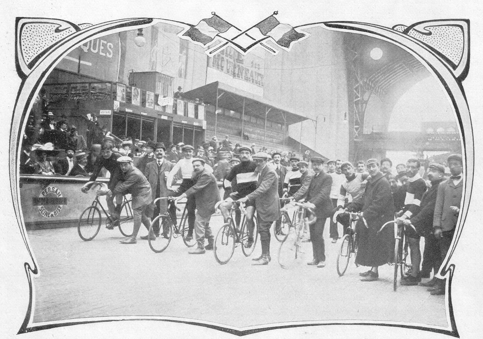 Radrennen Bol d'Or 1908